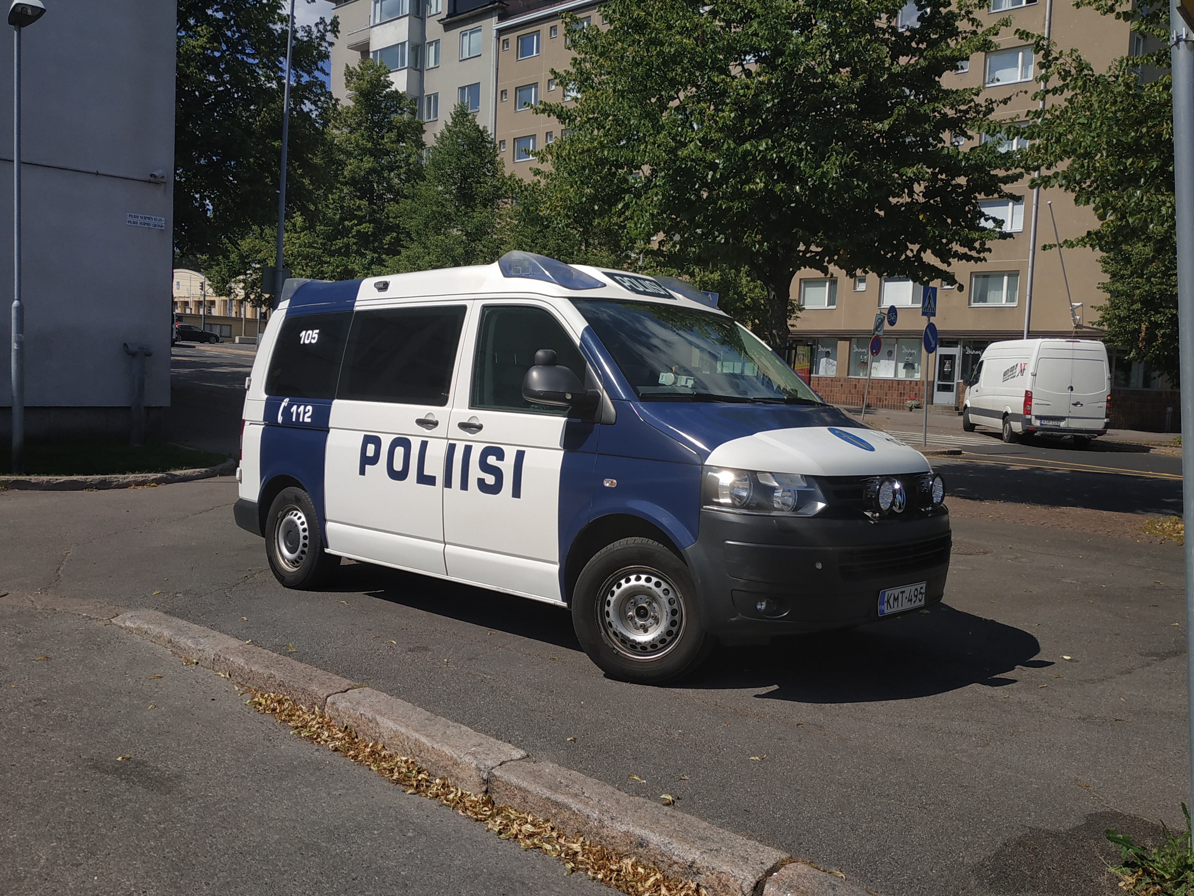 Volkswagen T5 de la police finlandaise à Helsinki